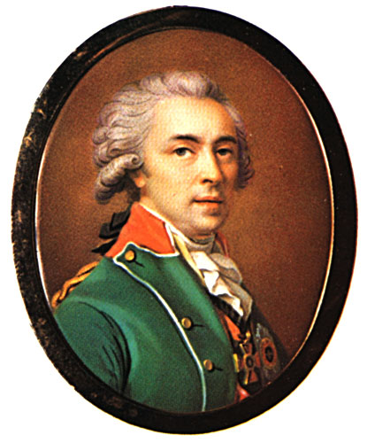 Неизвестный художник. Граф Алексей Иванович Мусин-Пушкин. 1790-е. Миниатюра. Эмаль на меди. 6,8 × 5,3 (овал). Государственный Русский музей